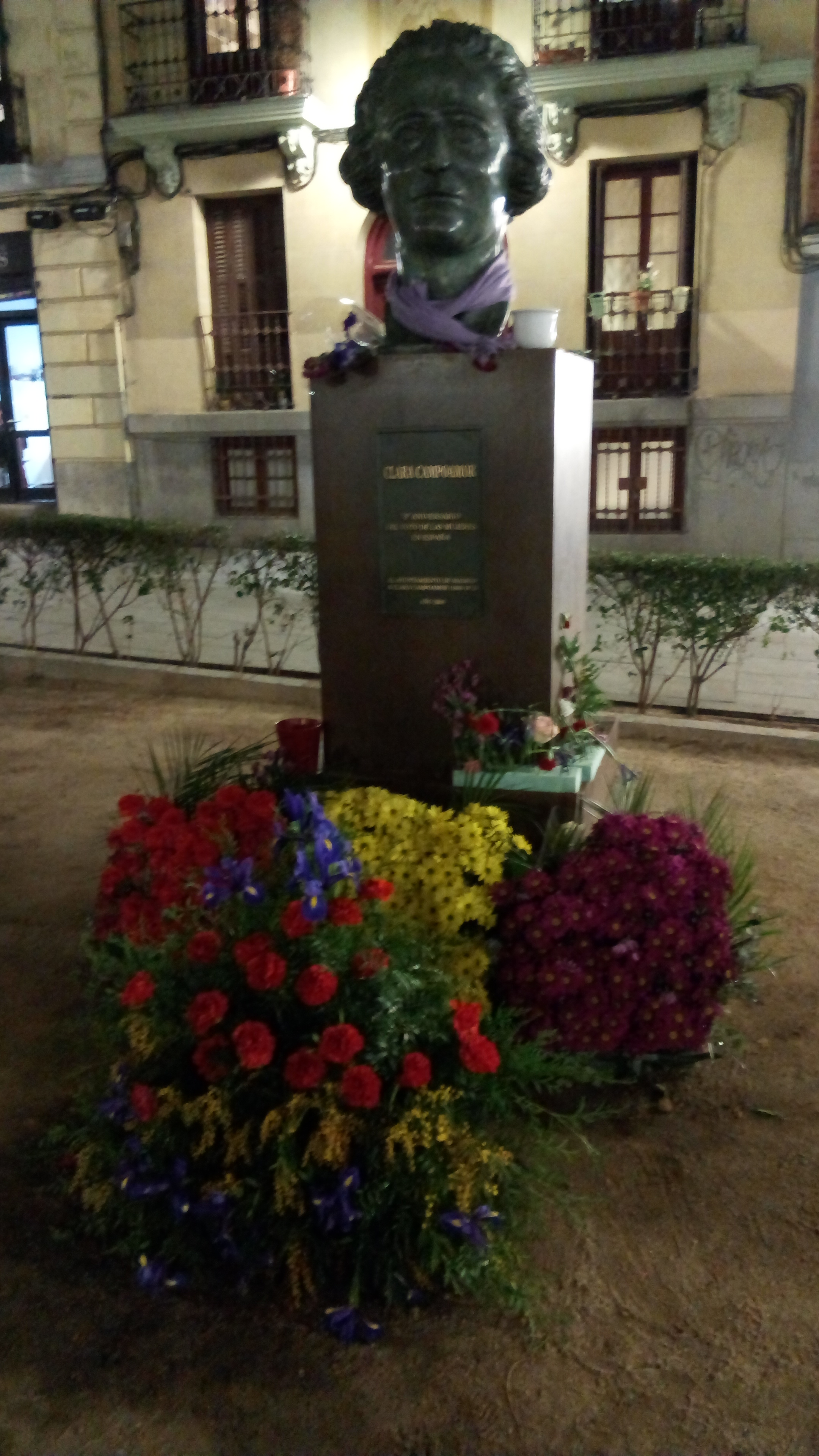 Ubicado en la Plaza Guardias de Corps (Madrid)